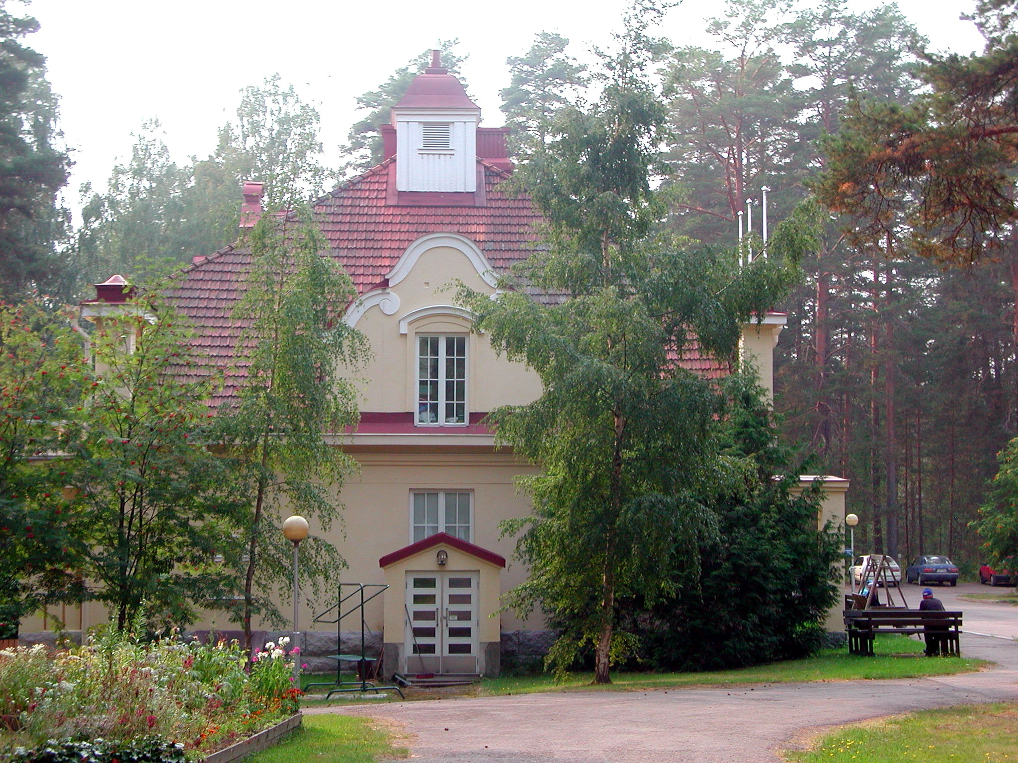 Hotelli Finlandia, eröffnet 1914. Punkaharju (Finnland), Finlandia